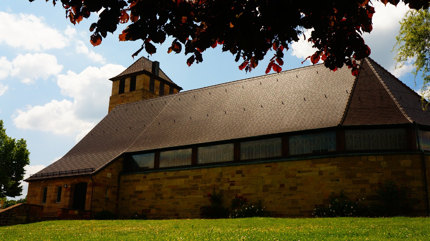 Außenfassade der Auferstehungskirche, Pforzheim